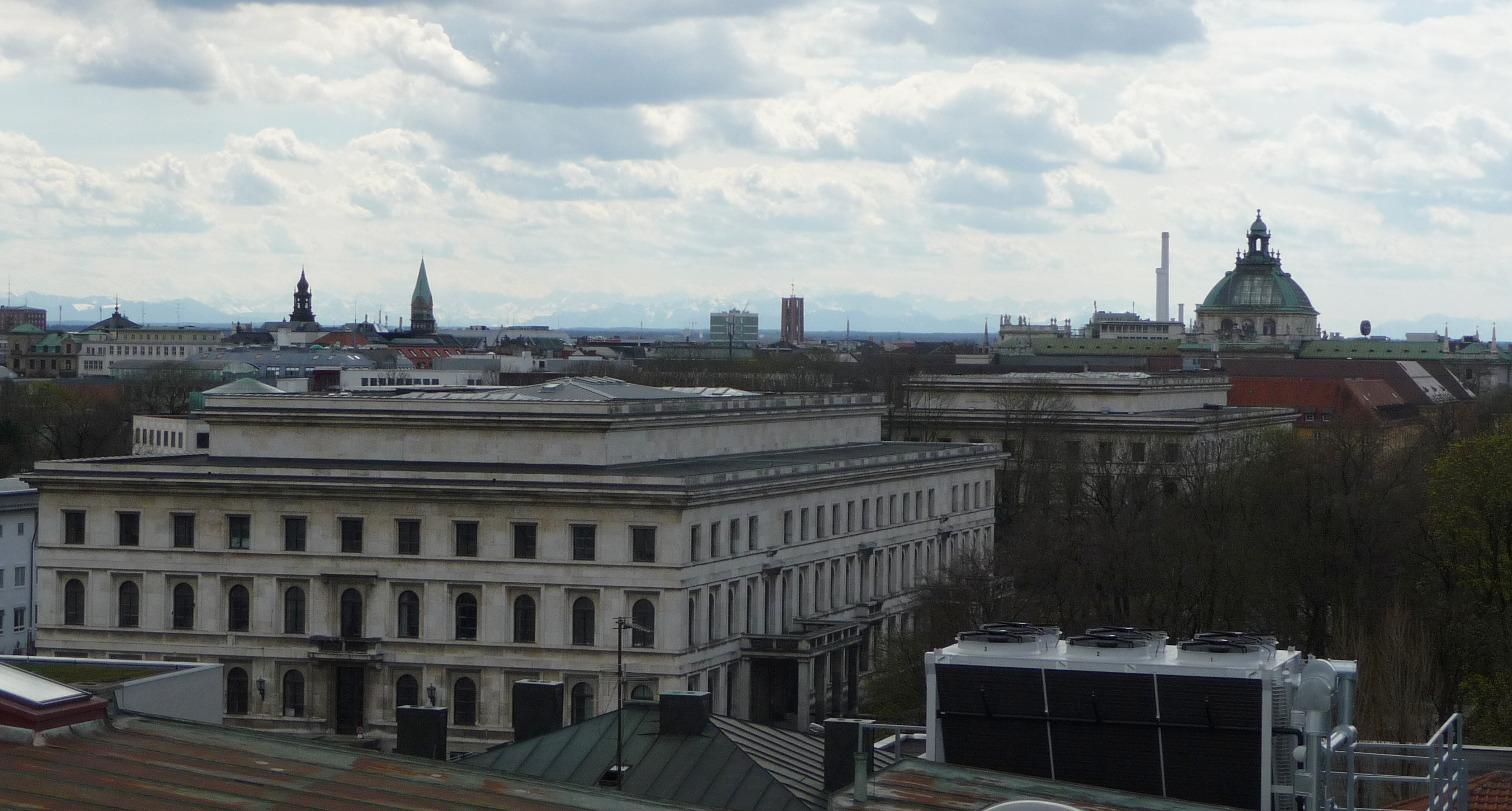 Im Vordergrund sieht man den ehemaligen "Führerbau", im Gebäude dahinter war die Parteizentrale der NSDAP untergebracht.